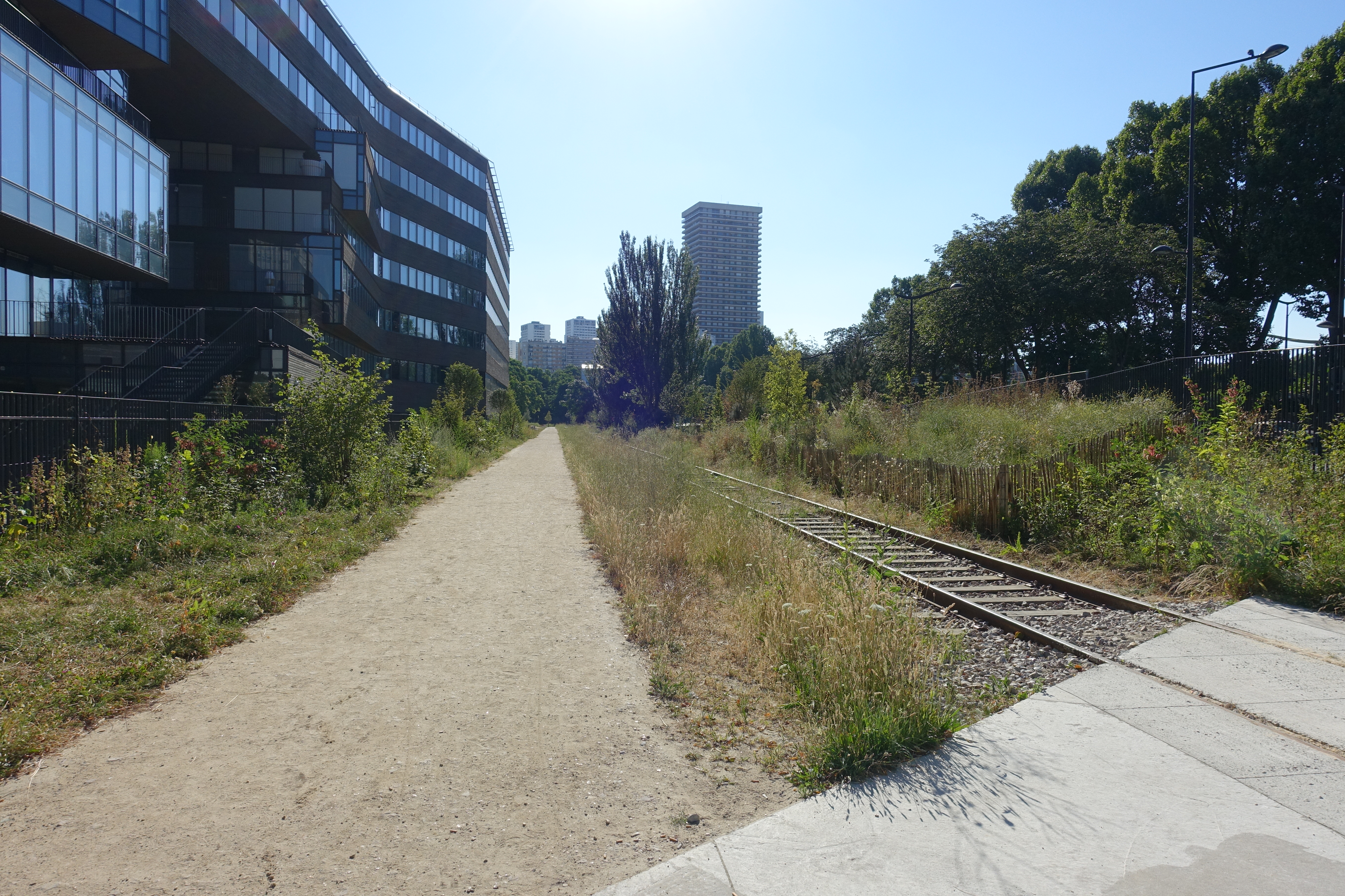 Ligne de chemin de fer de Petite Ceinture de Paris. A gauche: immeuble de bureaux (La Mutuelle Générale, 1-11 rue Brillat-Savarin), façade arrière face à la voie désaffectée de la Ligne de Petite Ceinture longeant le Boulevard Kellermann (à droite) en direction de la poterne des Peupliers, XIIIe arrondissement, Paris, France.